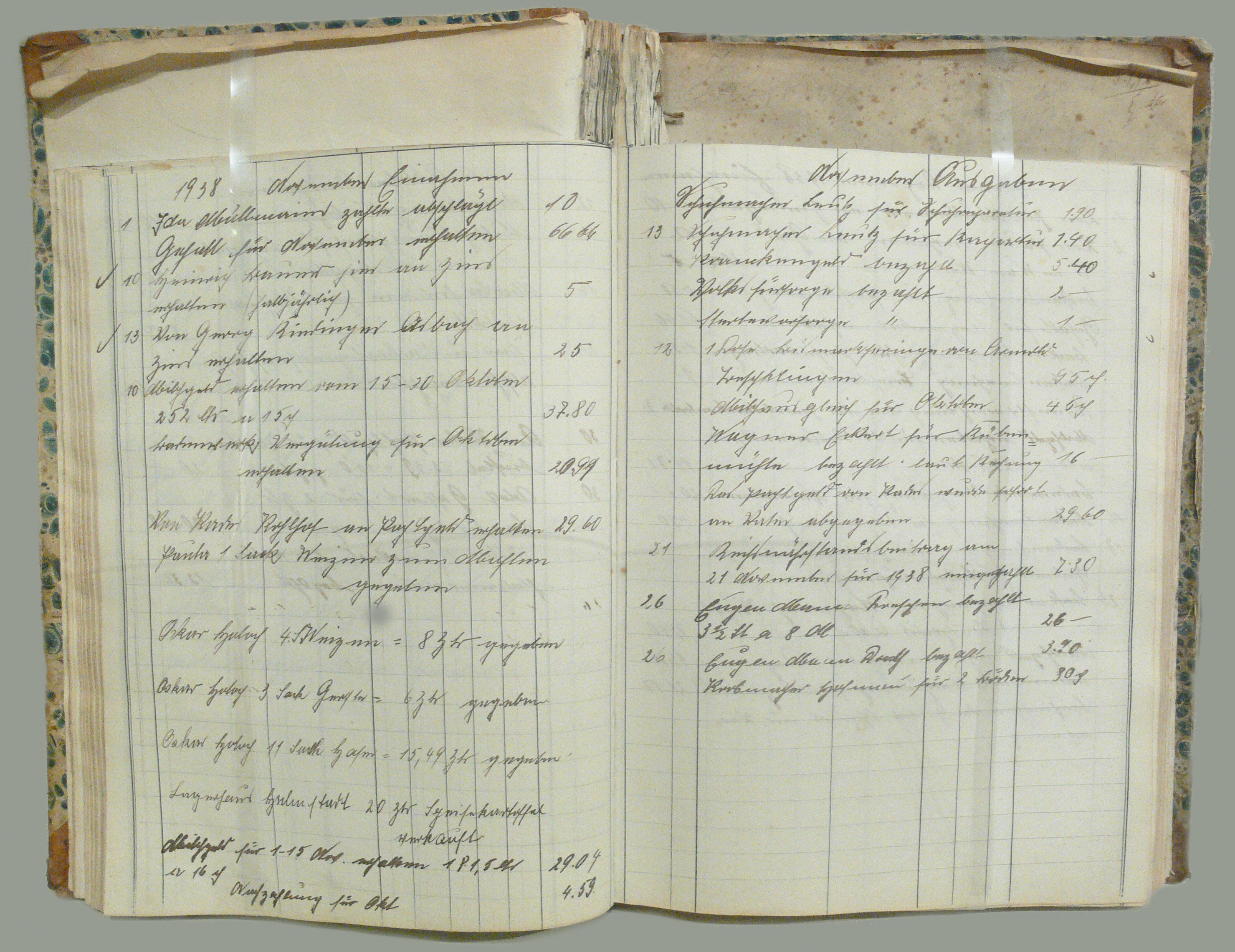 Haushaltsbuch einer Familie, geführt 1933–1943 (in einem ausrangierten Rechnungsbuch aus dem Rathaus); Papier, Pappe, Leder um 1930 Landesmuseum Württemberg (Außenstelle Museum für Volkskultur in Württemberg, Waldenbuch) 1.5.4, Inv. Nr. VK 1987/53-1401